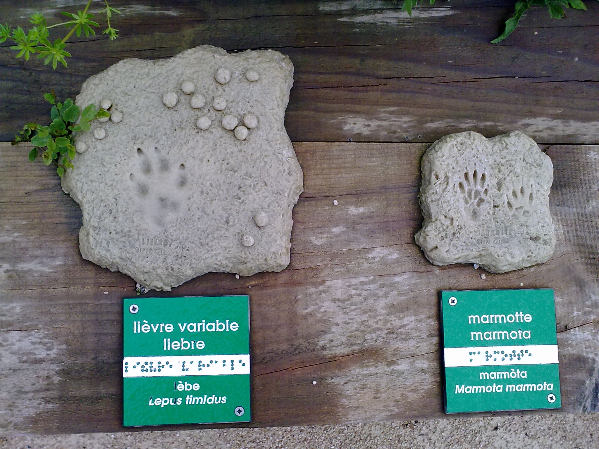 Etsaut, France